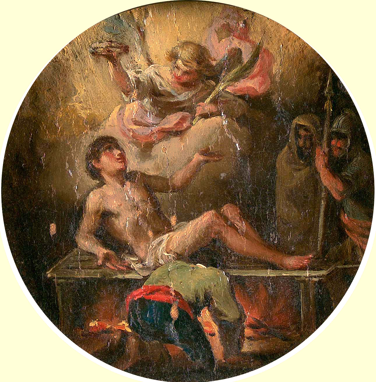 Martirio de San Lorenzo, tondo (11 cm de diámetro), óleo sobre lienzo.